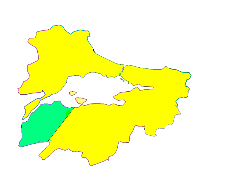 kendim yaptım